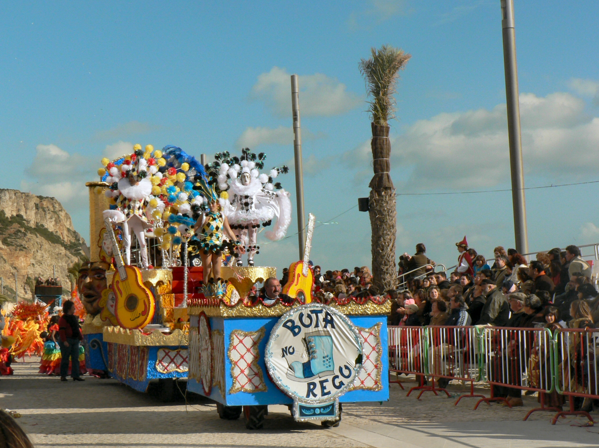 Desfile de Carnaval em Sesimbra 2007